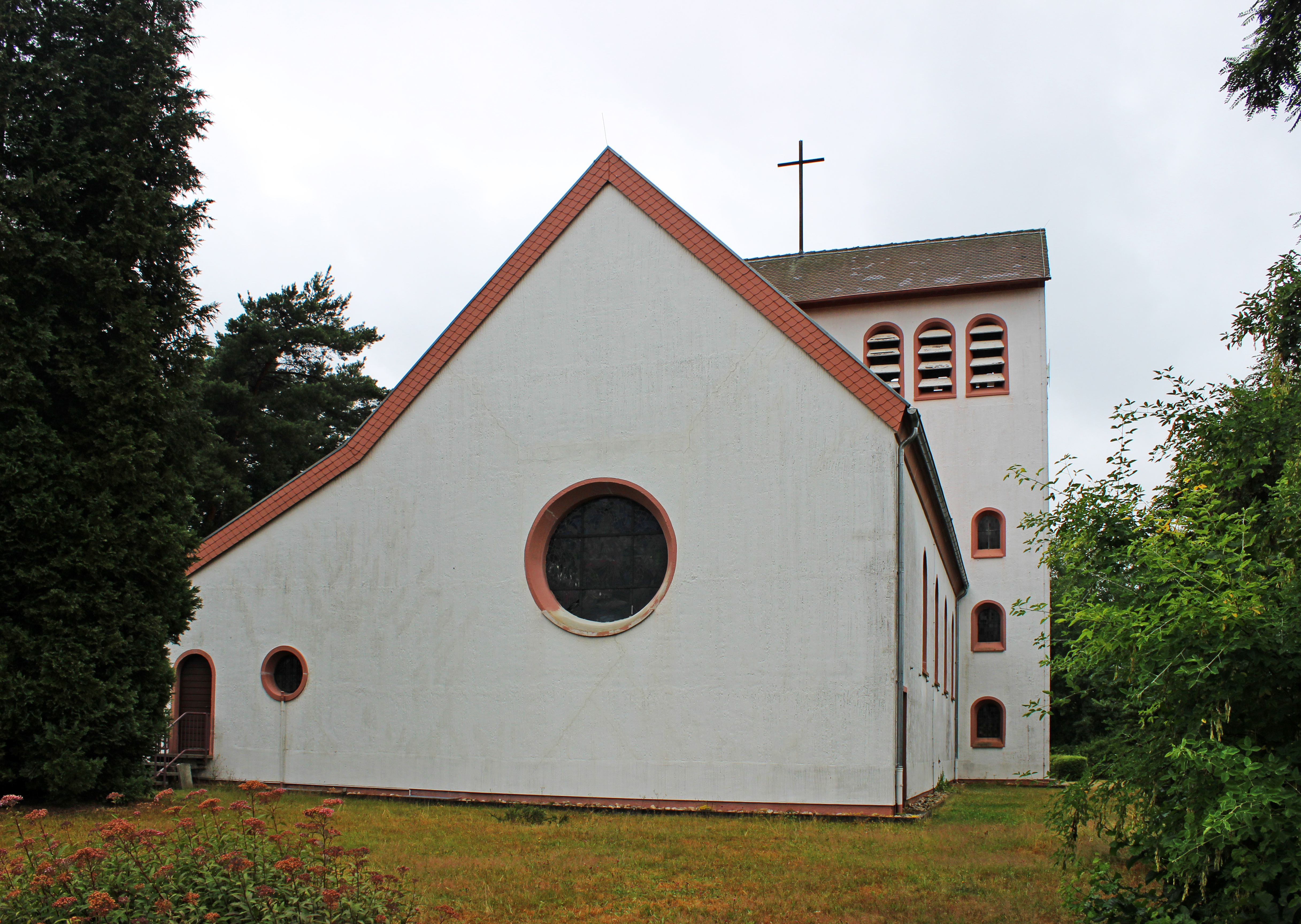 Die evangelische Christuskirche in Rohrbach (Saar)